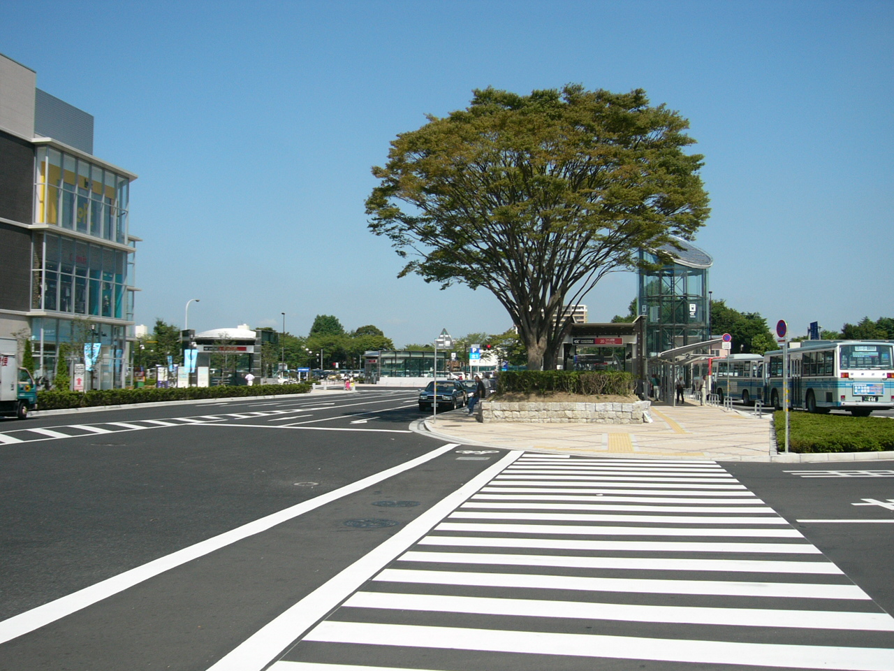 Tsukuba Station